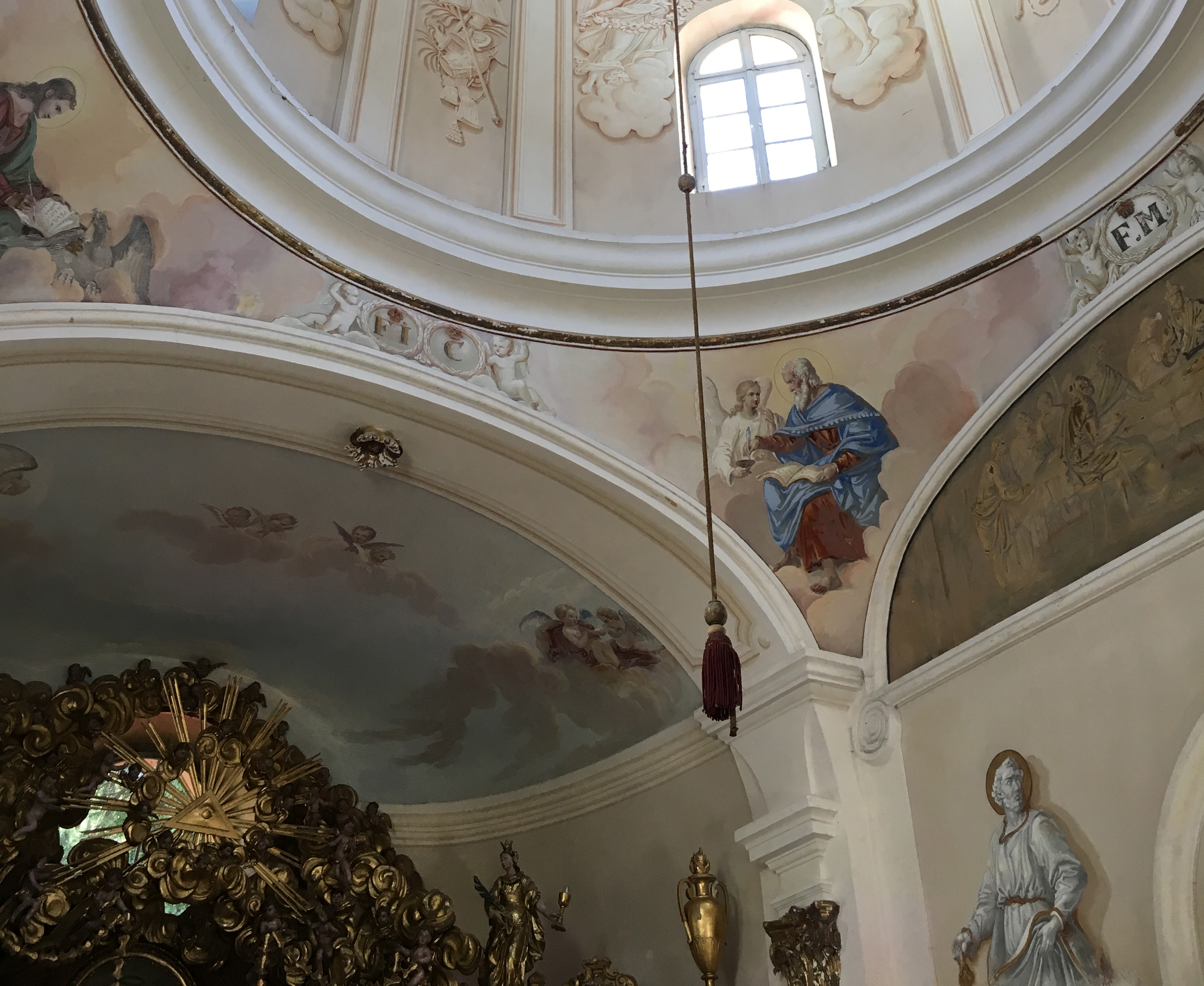 töpperkapelle